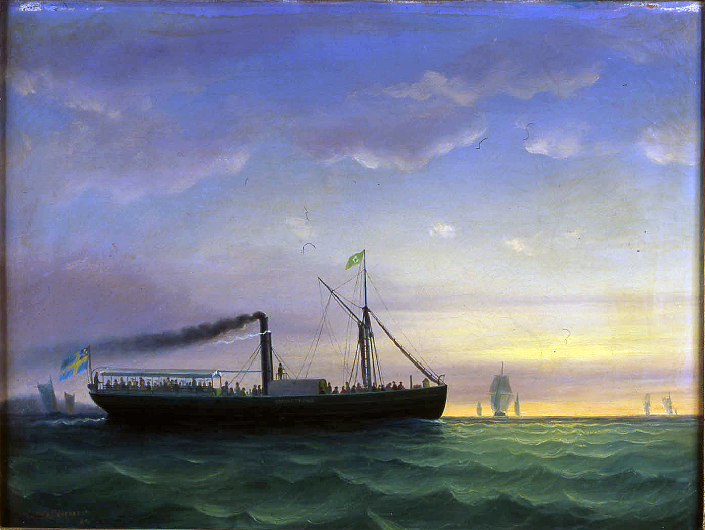 Fartygsporträttföreställande passagerarångfartyget ESAIAS TEGNÉR. Fartyget byggdes vid Motala Warf, Norrköping 1851. Rederi: Förenade Ångfartygsbolaget i Jönköping.